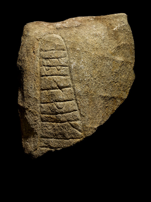 Foto af Roberto Fortuna